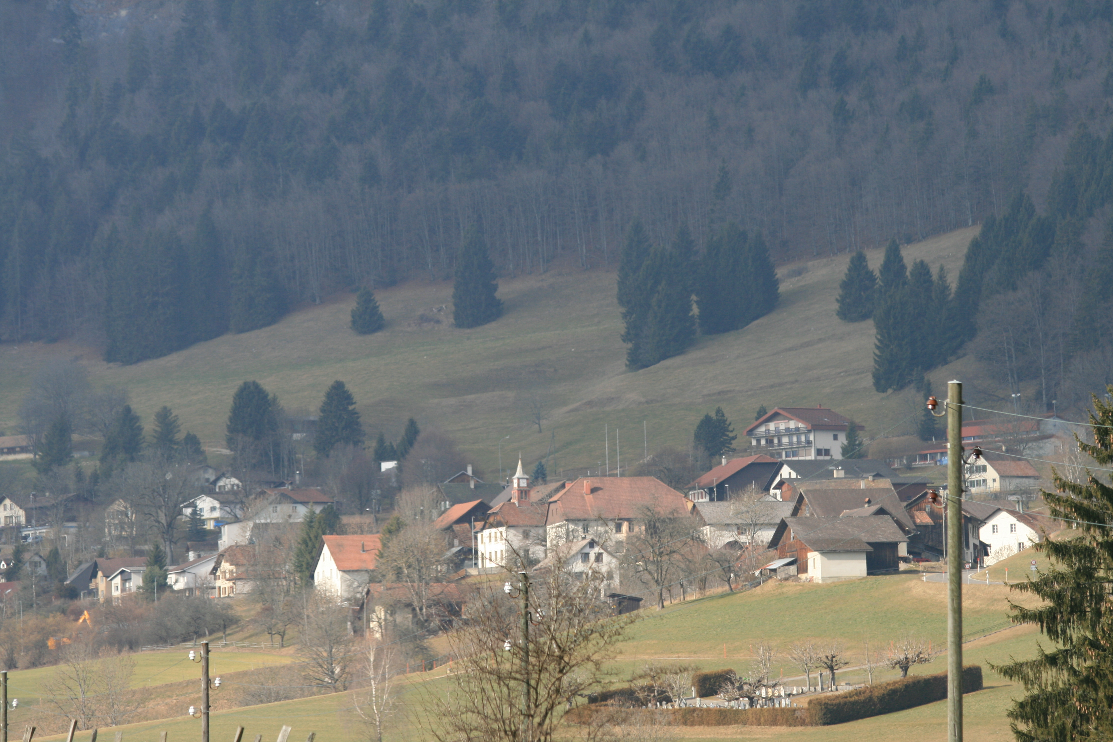 Le Fuet, Blick von Saicourt